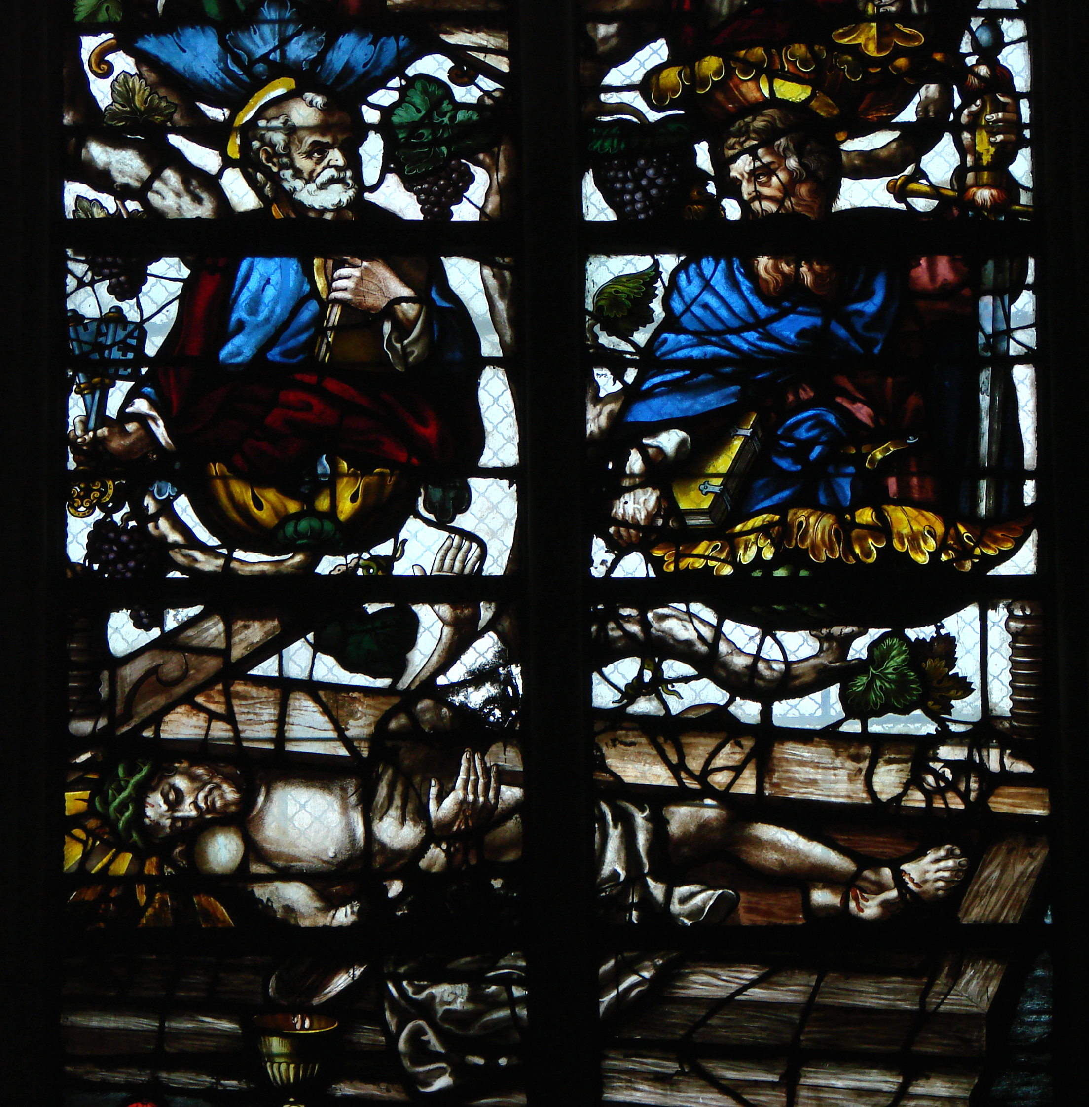 Vitrail du Pressoir mystique (1625) par Linard Gontier: le Christ et les douze apôtres. Détail: le Christ, Saint Pierre (à gauche) et Saint Paul. Cathédrale Saint-Pierre-et-Saint-Paul de Troyes.